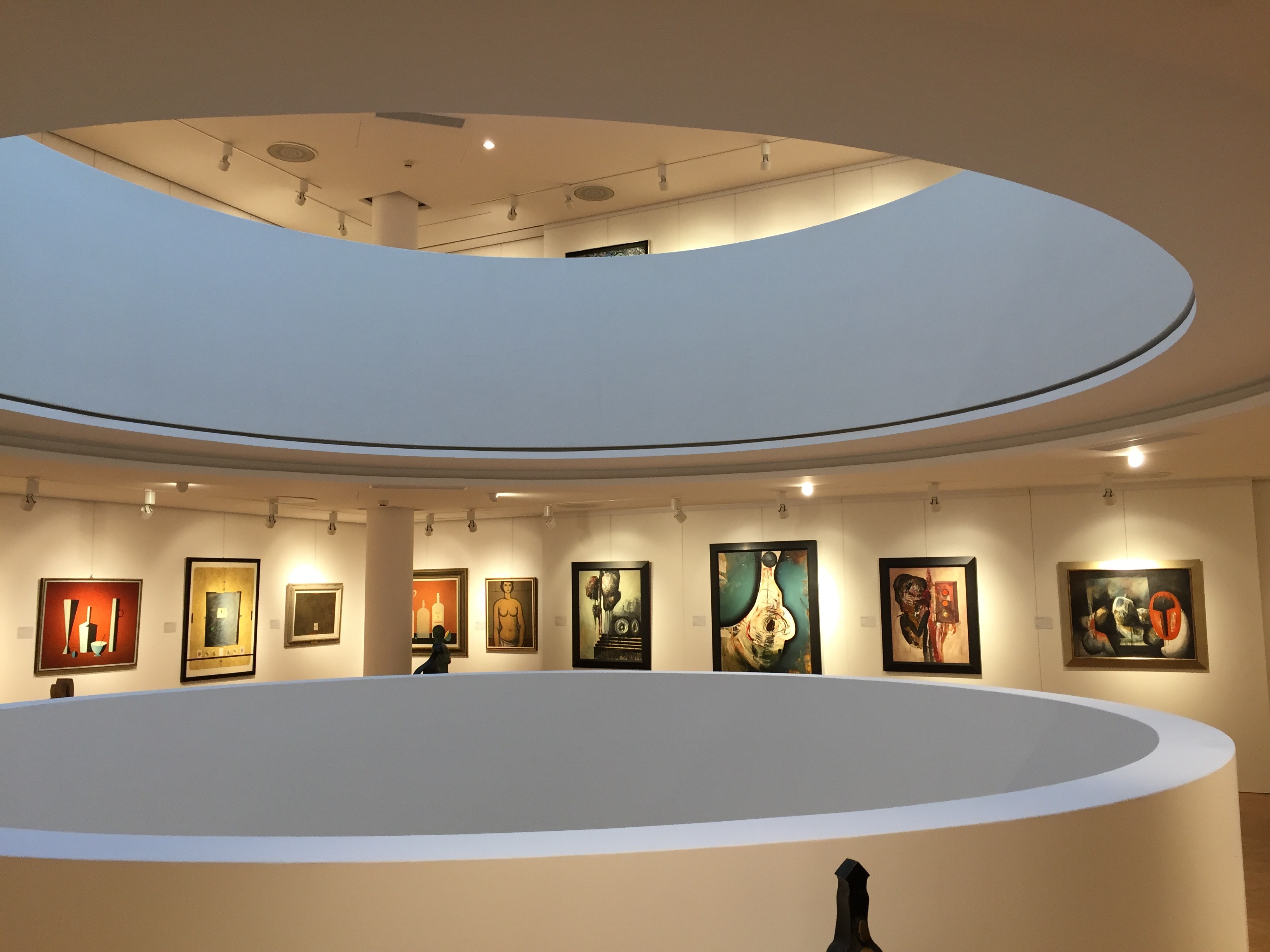 Galéria Nedbalka